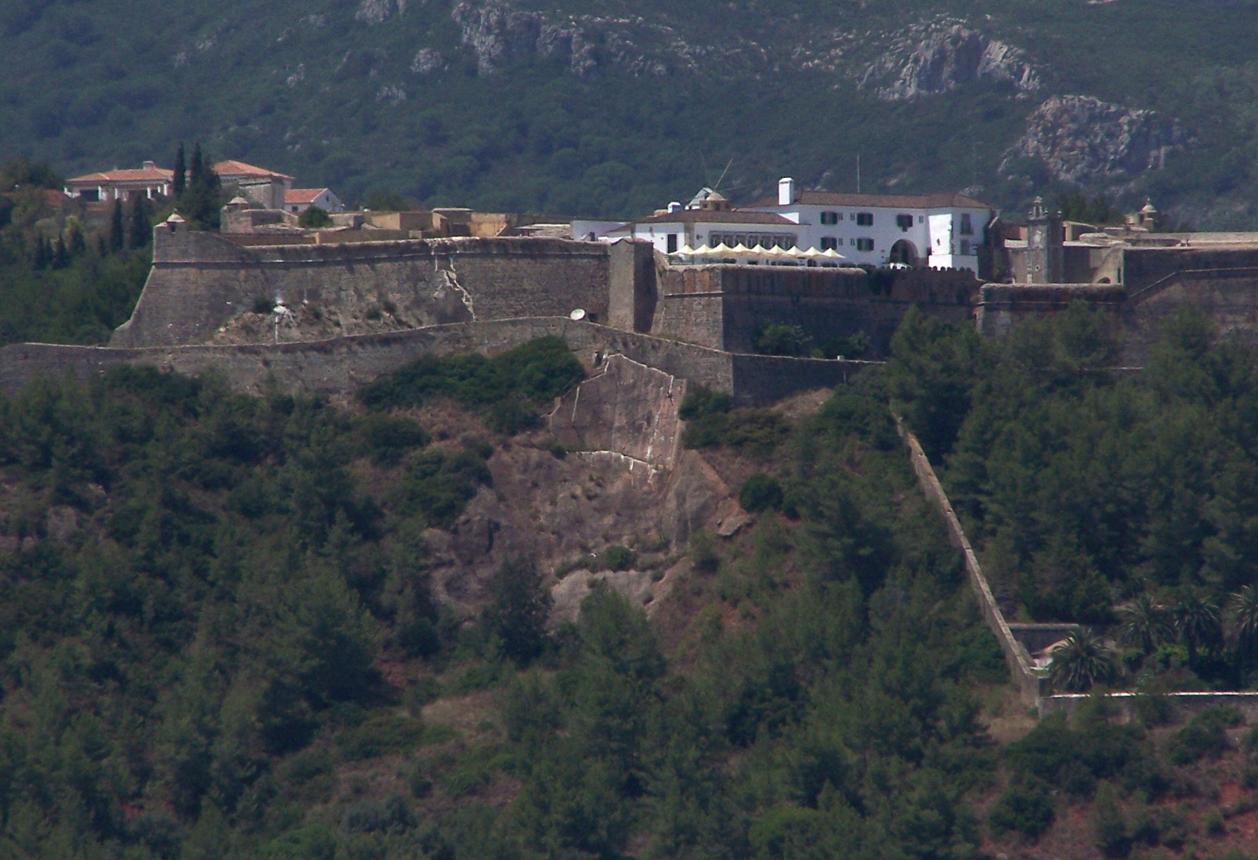 A Pousada de São Filipe situa-se no Forte/Fortaleza de São Filipe, situado numa colina sobranceira à cidade de Setúbal com vista sobre esta e a barra do Sado. Integra a rede Pousadas de Portugal com a classificação de Pousada Histórica. Setúbal is a city and a municipality in Portugal with a total area of 172.0 km² and a total population of 118,696 inhabitants in the municipality. The city proper has 89,303[1] inhabitants. The municipality is composed of 8 parishes, and is located in the district of Setúbal.